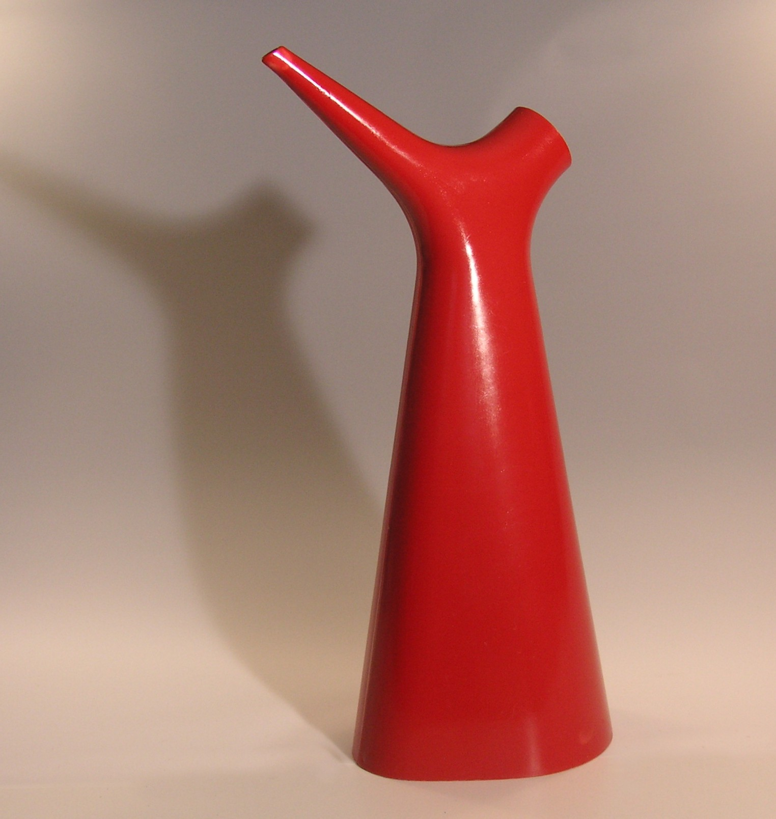 Carl-Arne Bregers vattenkanna